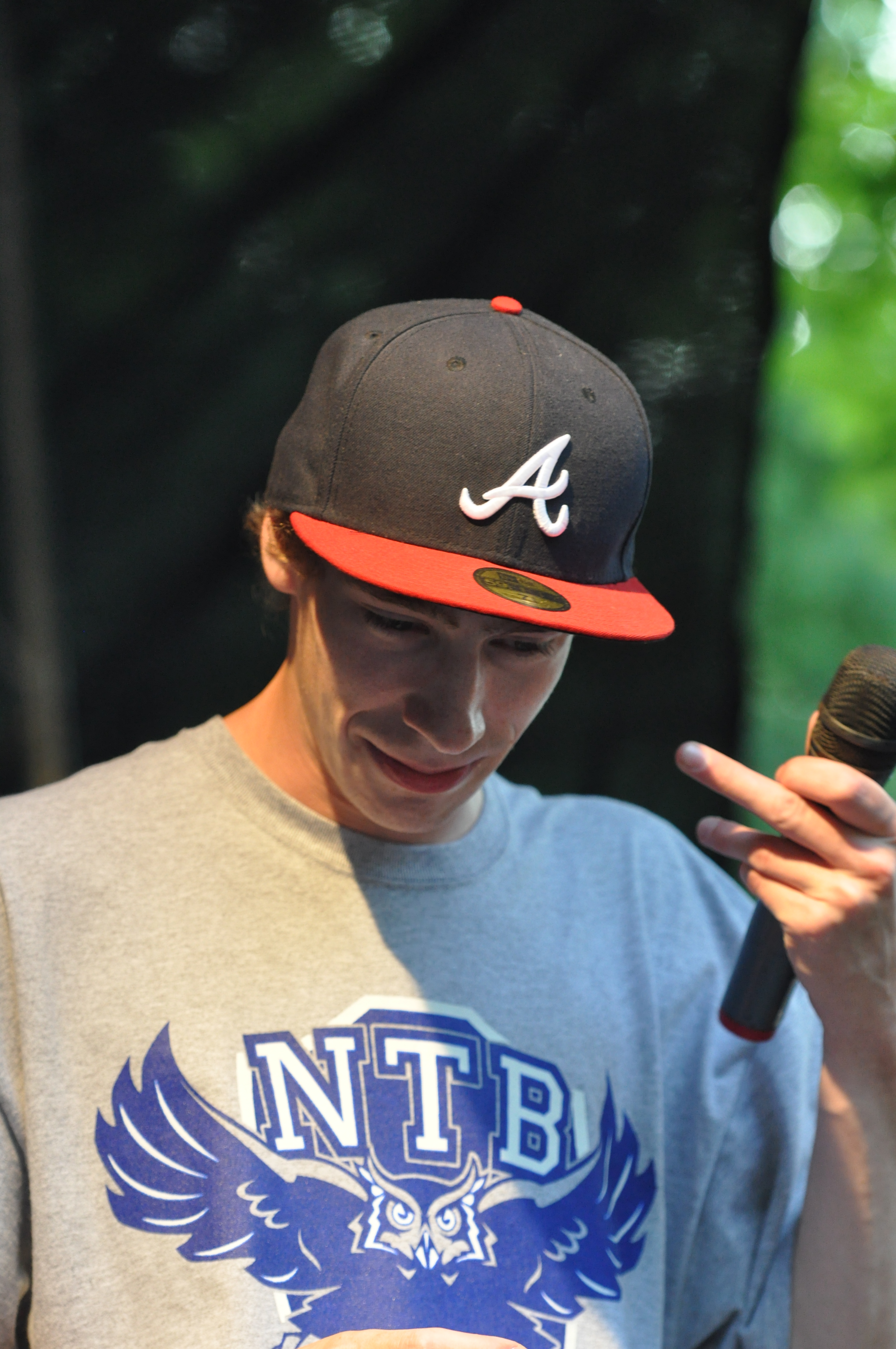 Jephza